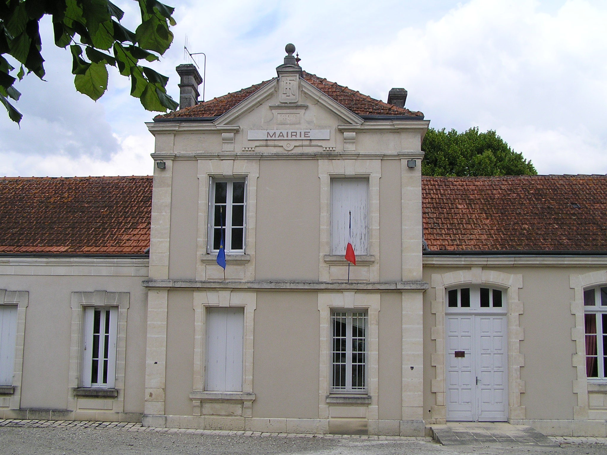 mairie de Bourg-Charente